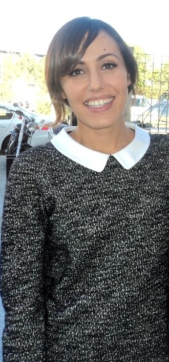 La actriz Irene Montalà